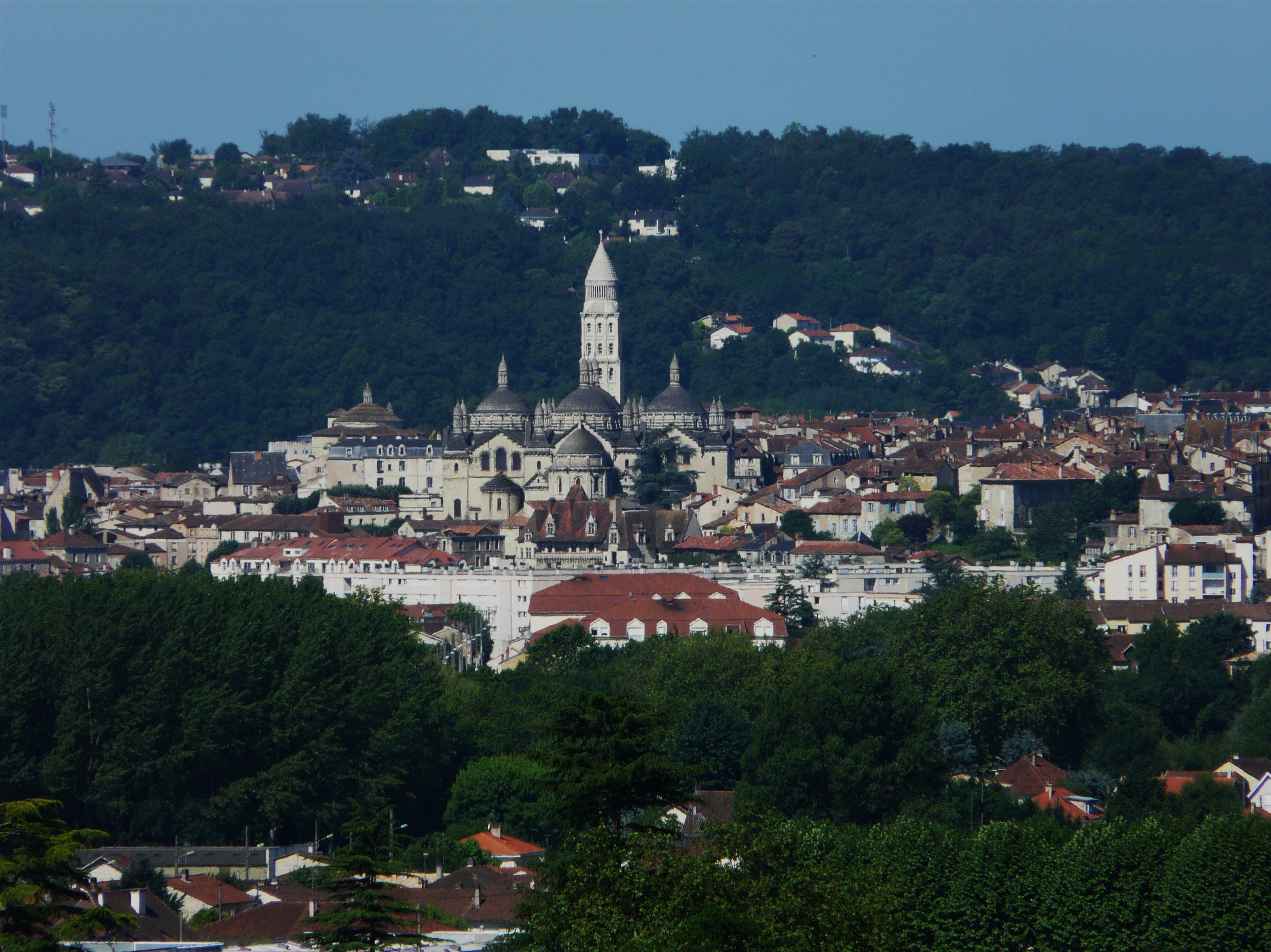 Vue générale de Périgueux depuis les hauteurs de Trélissac